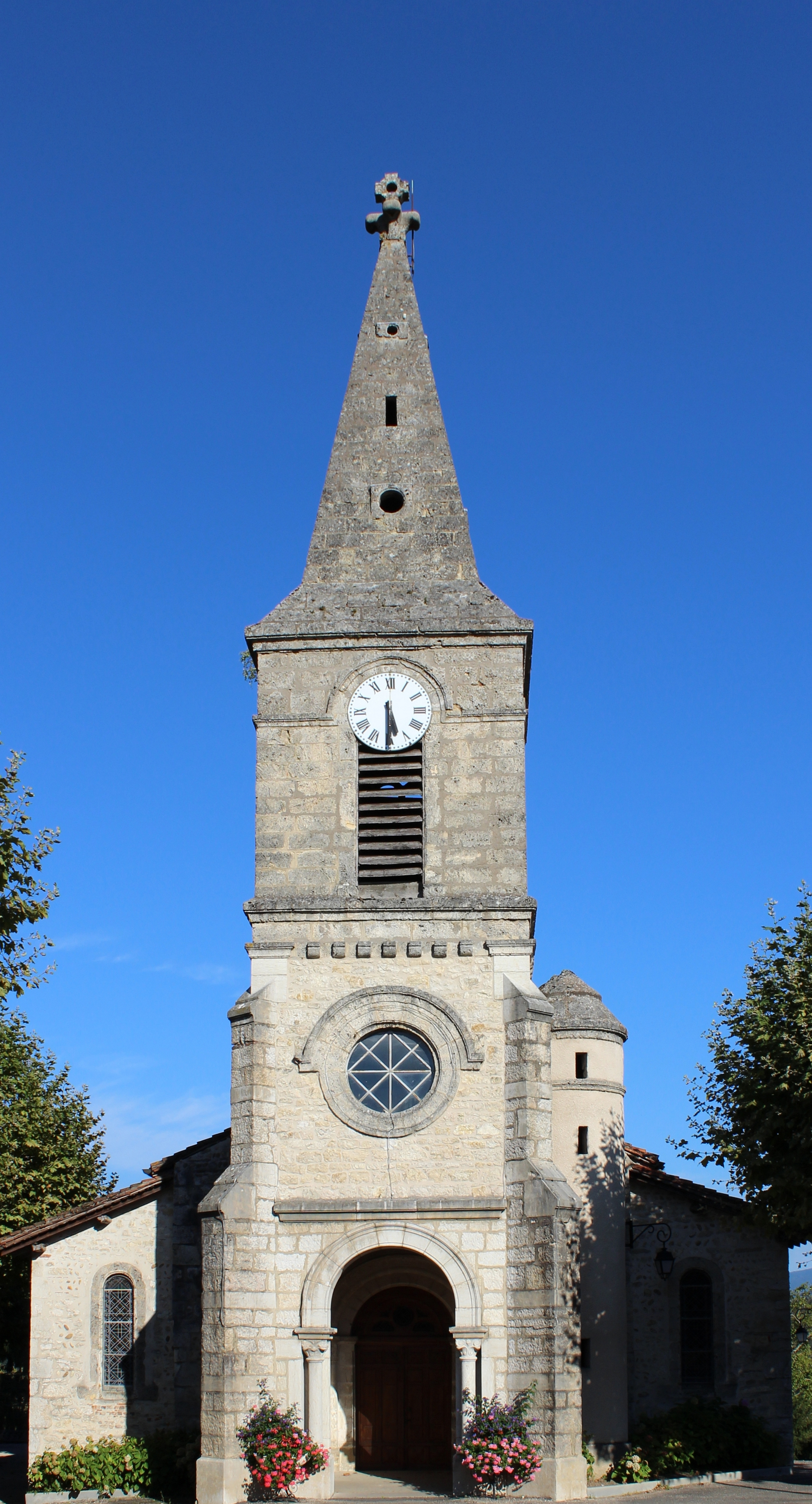 Église de Druillat (Ain).